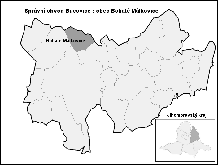 Hranice Bohaté_Málkovice (Vyškov-(Bučovice)- czech republic)